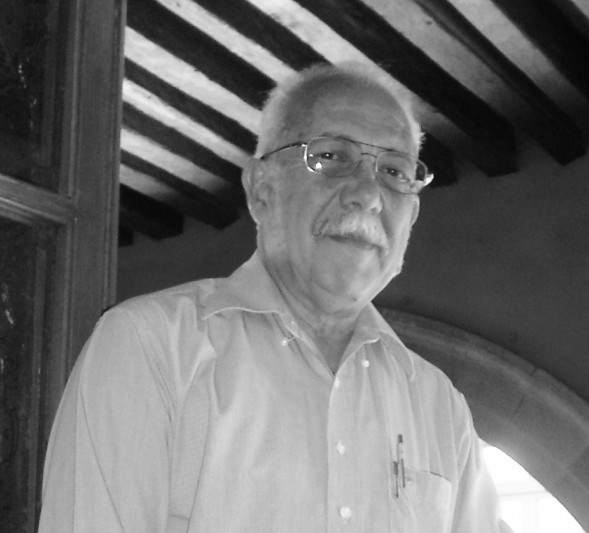 El artista plástico Jorge Figueroa Acosta